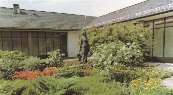 Innenhof des Zentralinsituts für Herz-Kreislauffoschung der Akademie der Wissenschaften der DDR